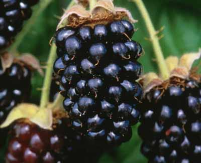 Visit us at